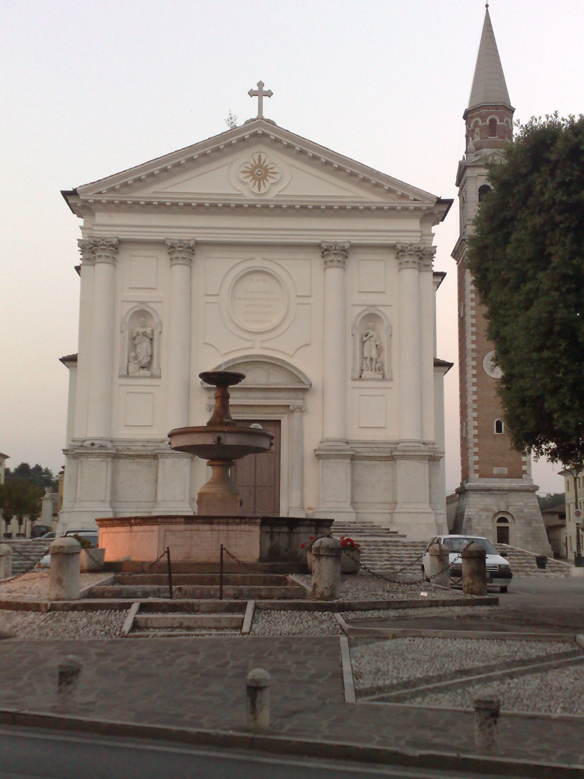 Piazza di Crespano del Grappa con fontana e Duomo